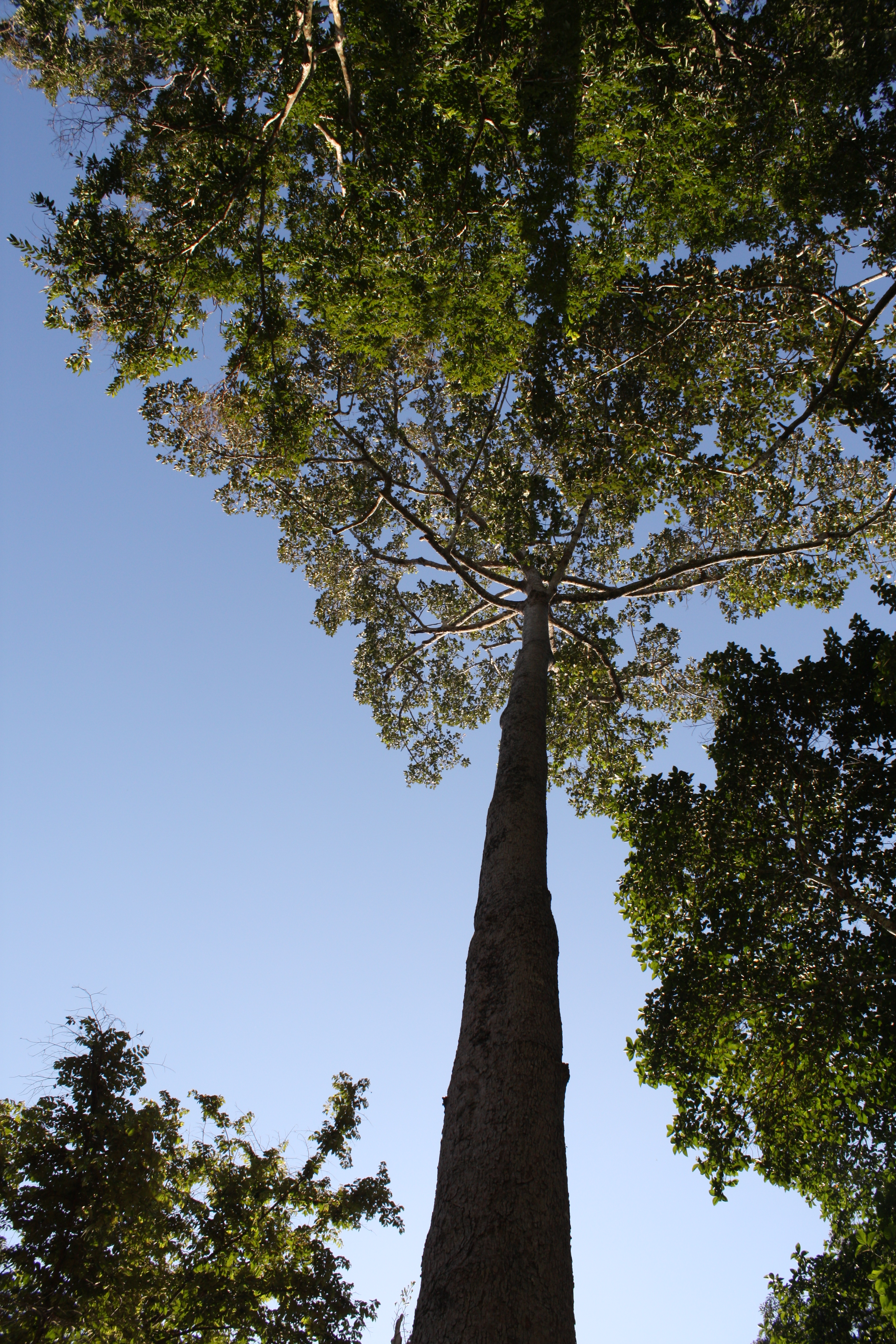 Dipterocarpus alatus in Cambodia